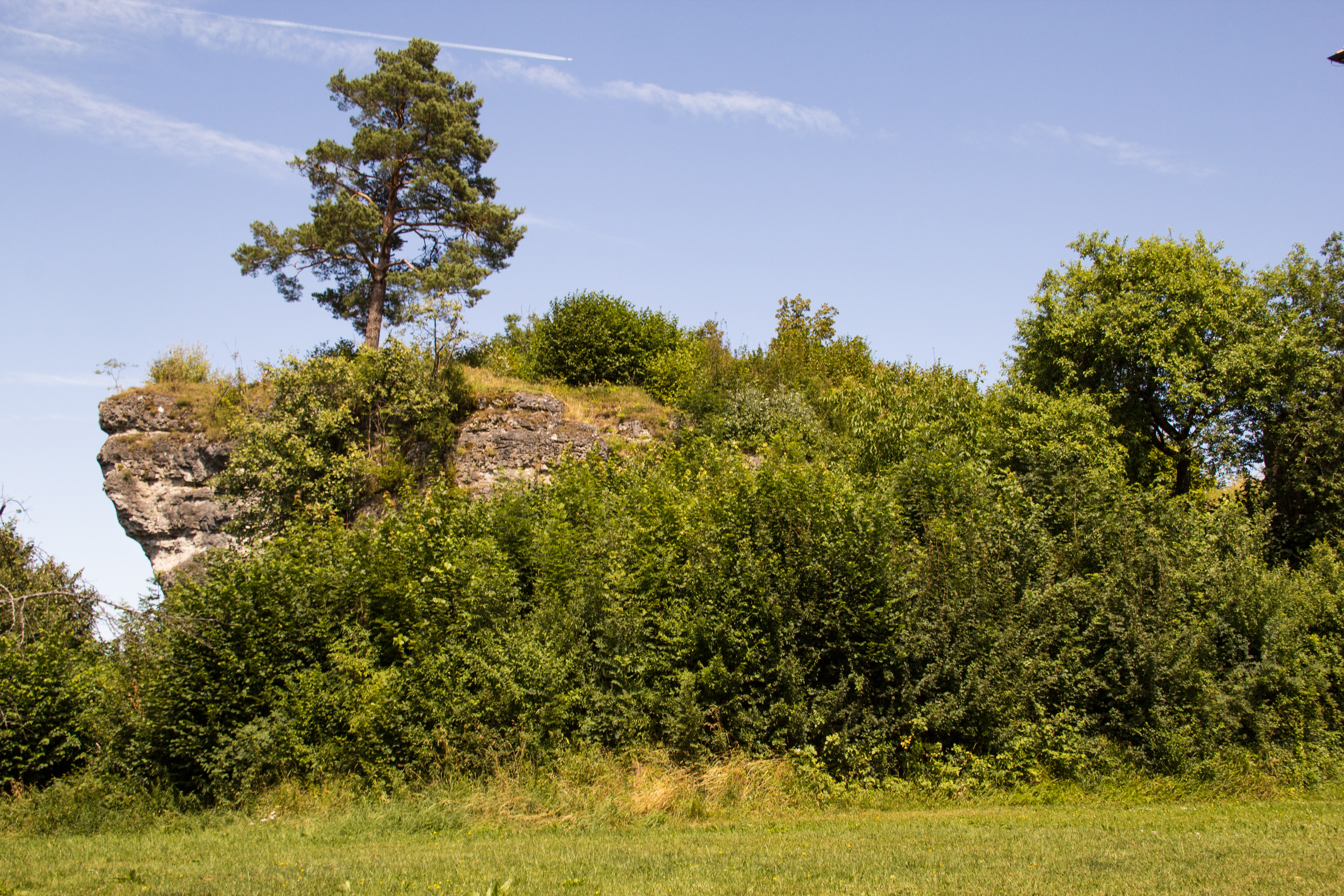 Dolomitfelsen, Breitenstein, Königstein